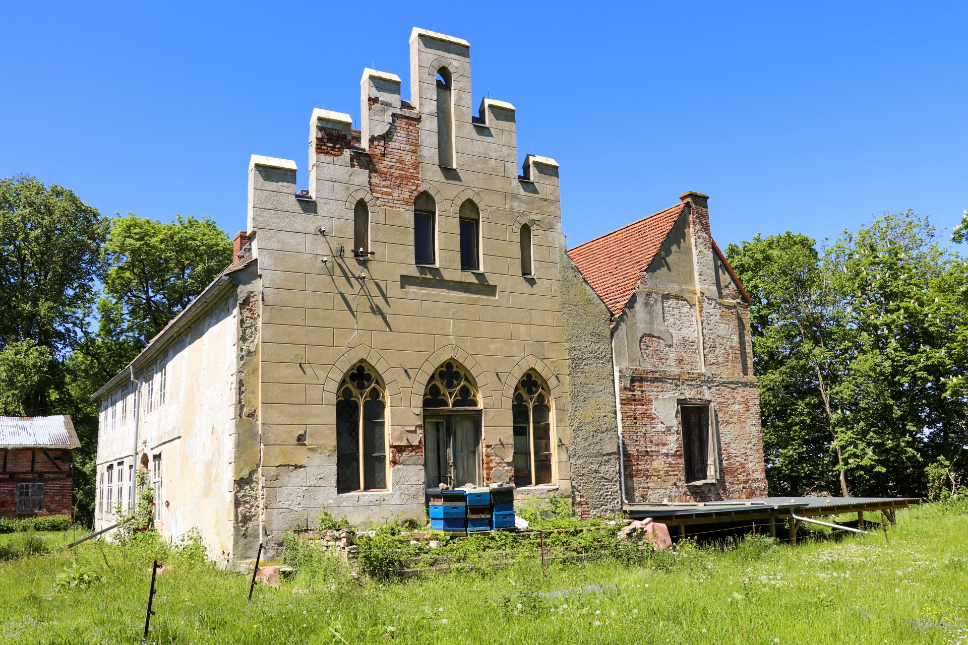 Ralow 2017 von Südosten